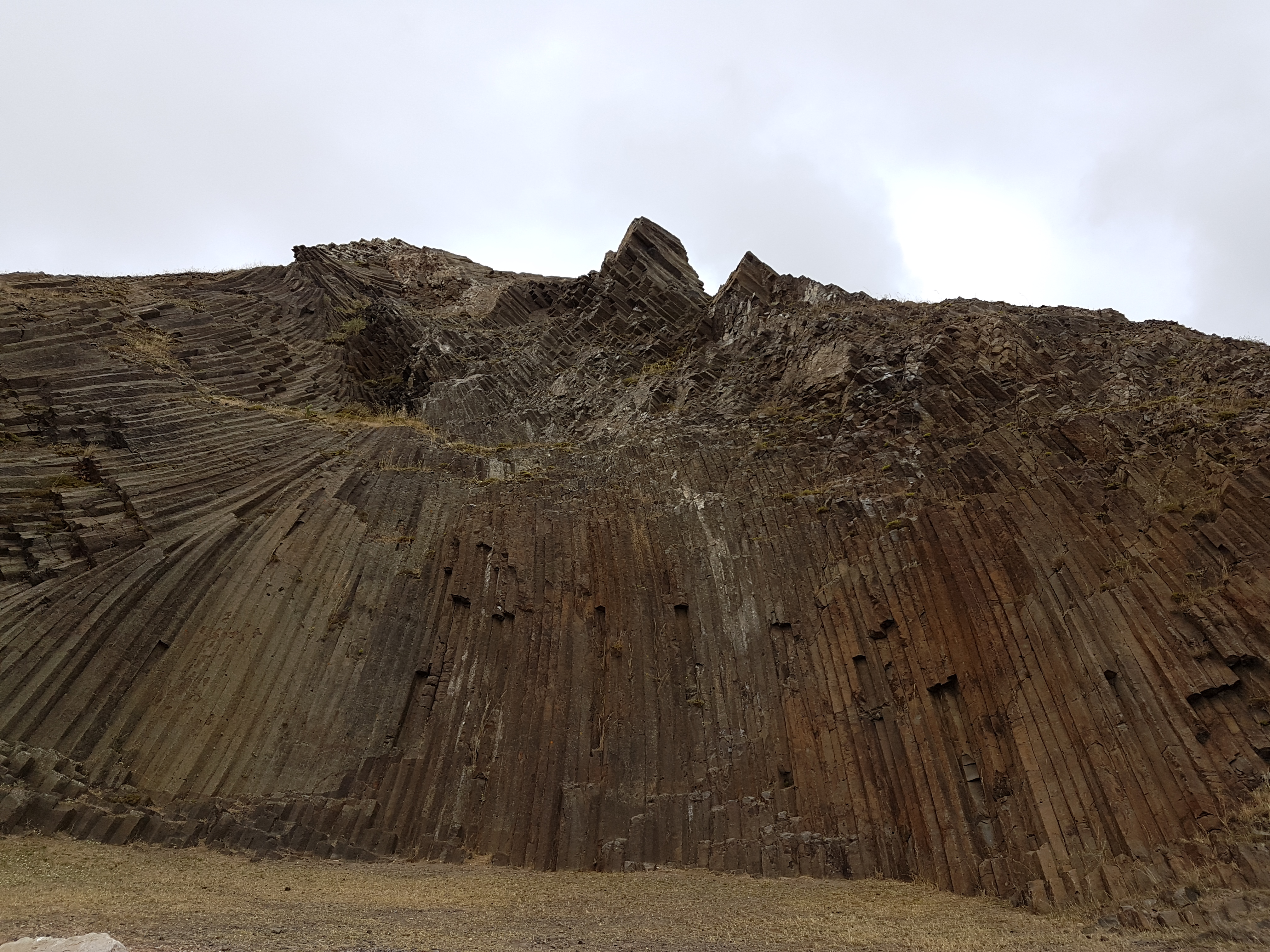 Säulenbasalt am Pico de Ana Ferreira